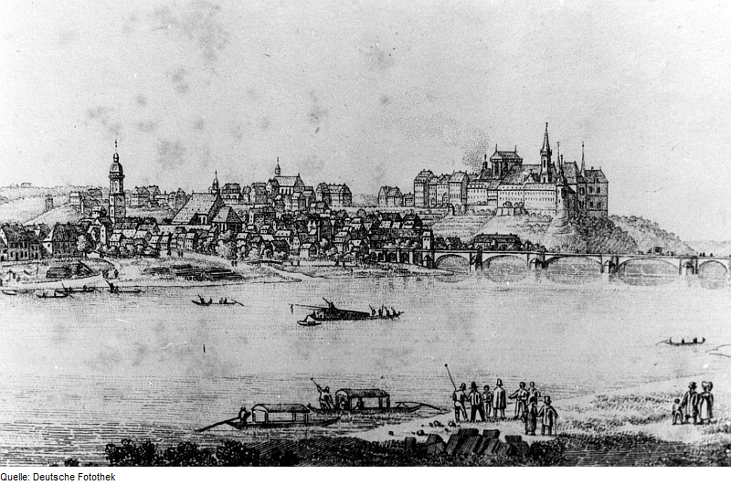 Original image description from the Deutsche Fotothek Meißen. Stadtansicht von Westen, aus: Reinhard, Meißen, 1829